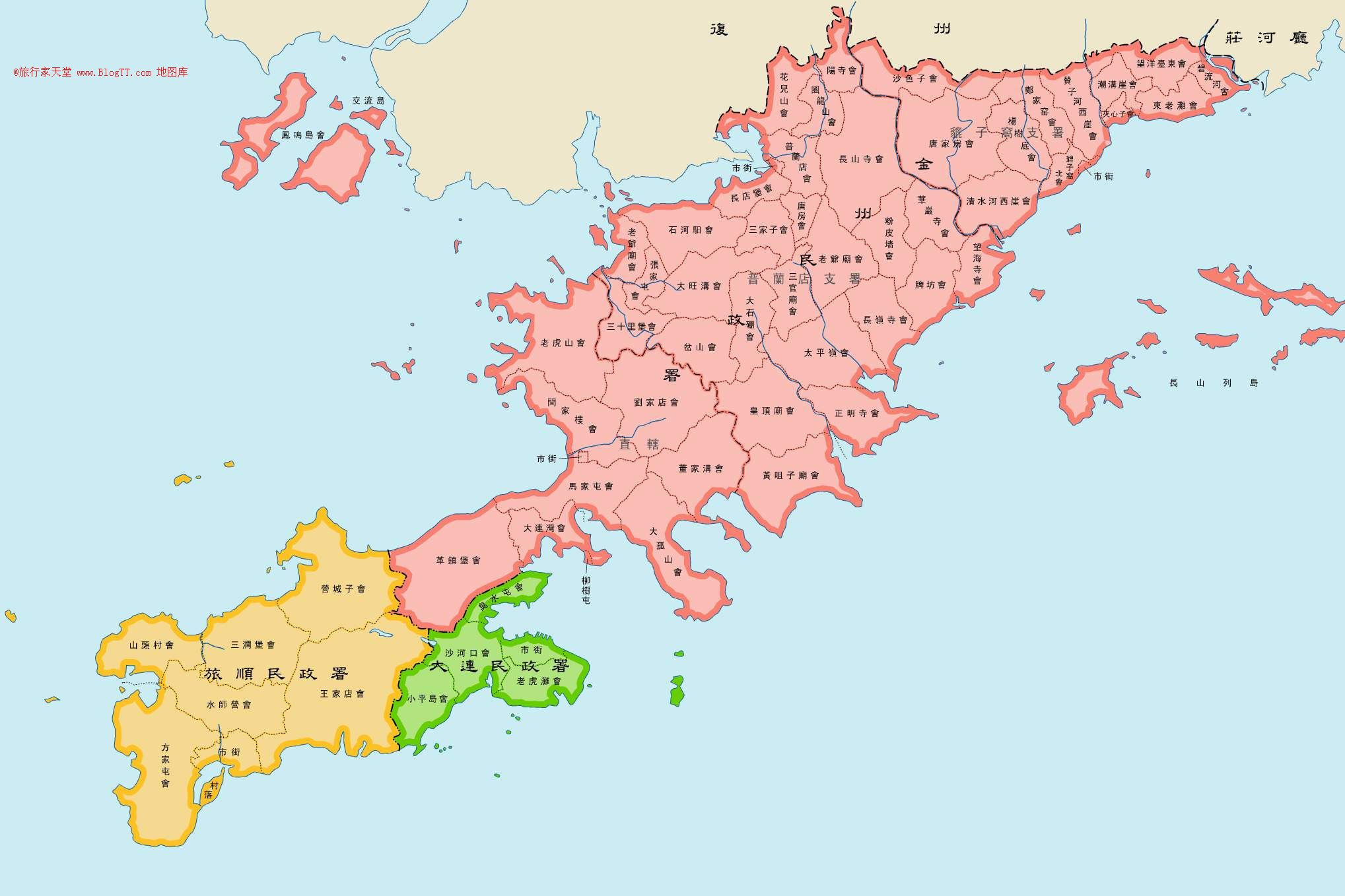 关东州